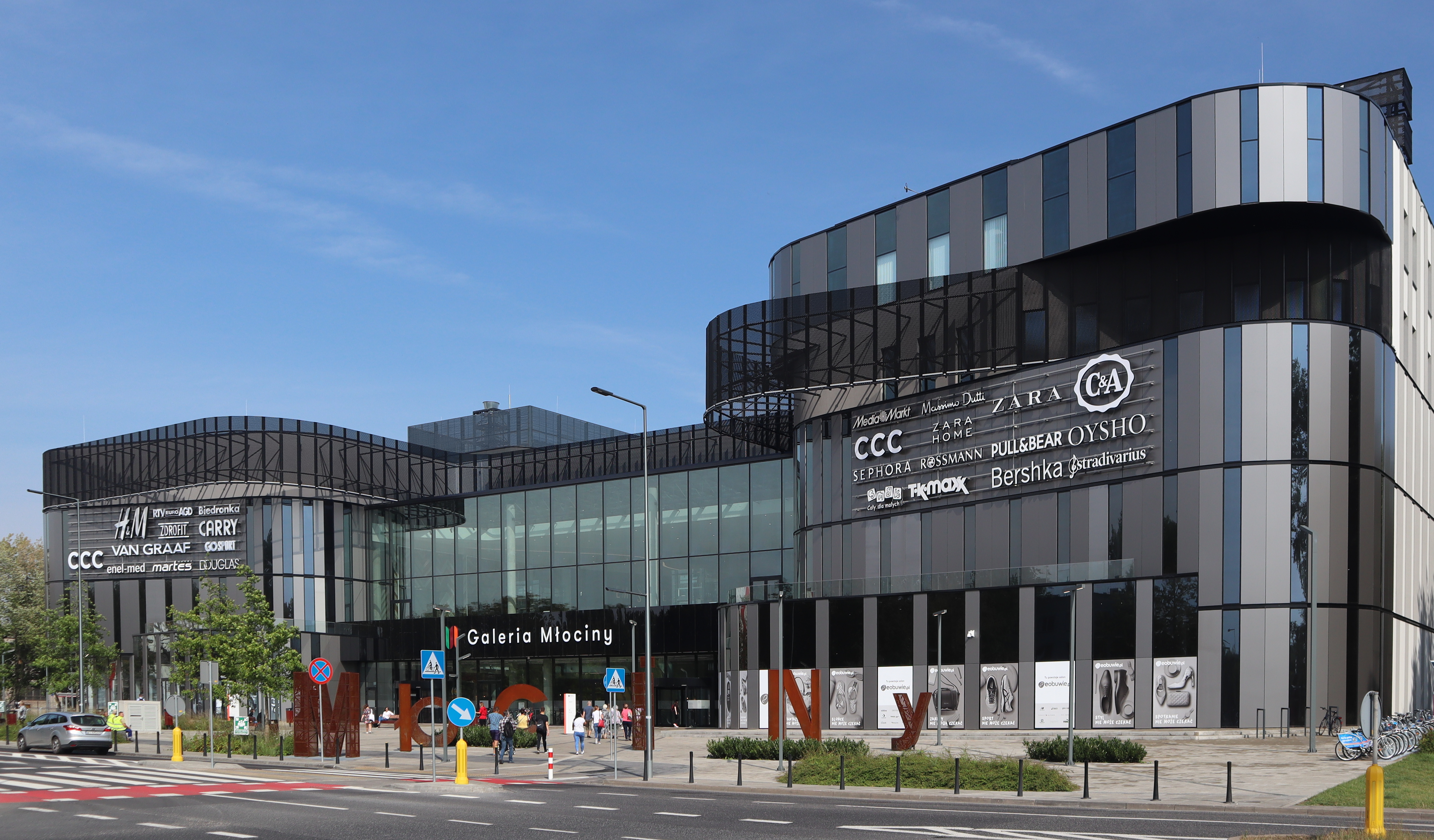 Centrum handlowe Galeria Młociny w Warszawie od strony metra.